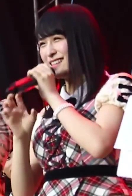 AKB48のメンバー川本紗矢